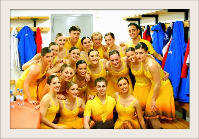 Les Atlantides Championnat du monde avril 2011 Helsinki Finlande